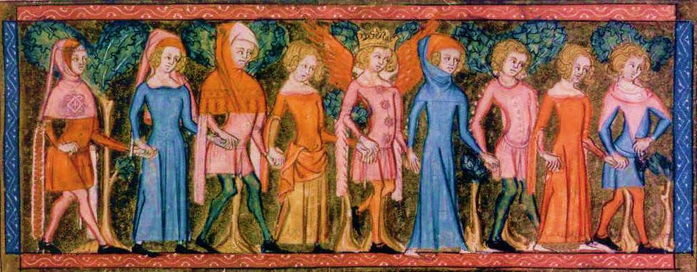 Farandole enluminure, XIVe siècle